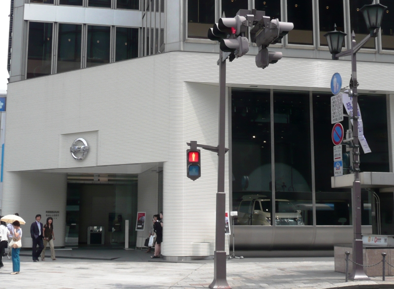 Nissan Ginza gallery.